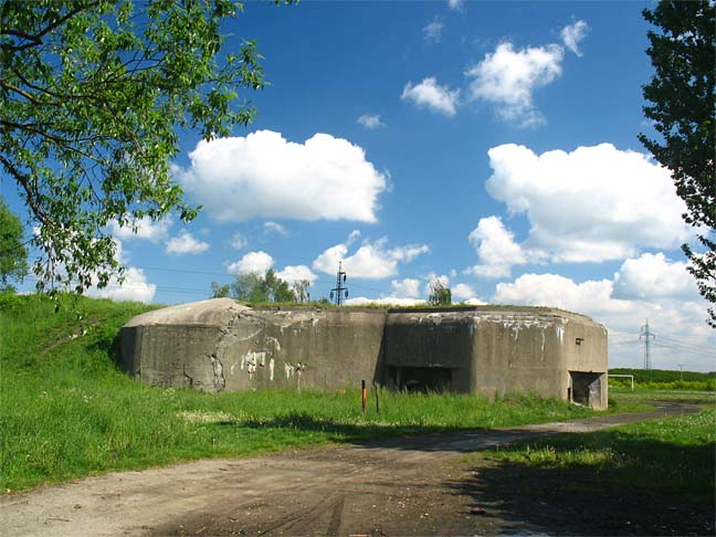 Pěchotní srub MO-S 4 "U šedé vily"